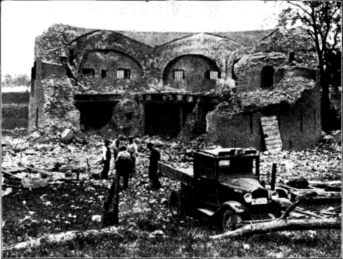 Algemeen Handelsblad Het sloopwerk aan het fort Schiphol nabij het vliegveld, is zover gevorderd, dat nog slechts de helft overeind staat. Van den weg af kan men duidelijk zien hoe dik de muren van dit oude fort zijn.